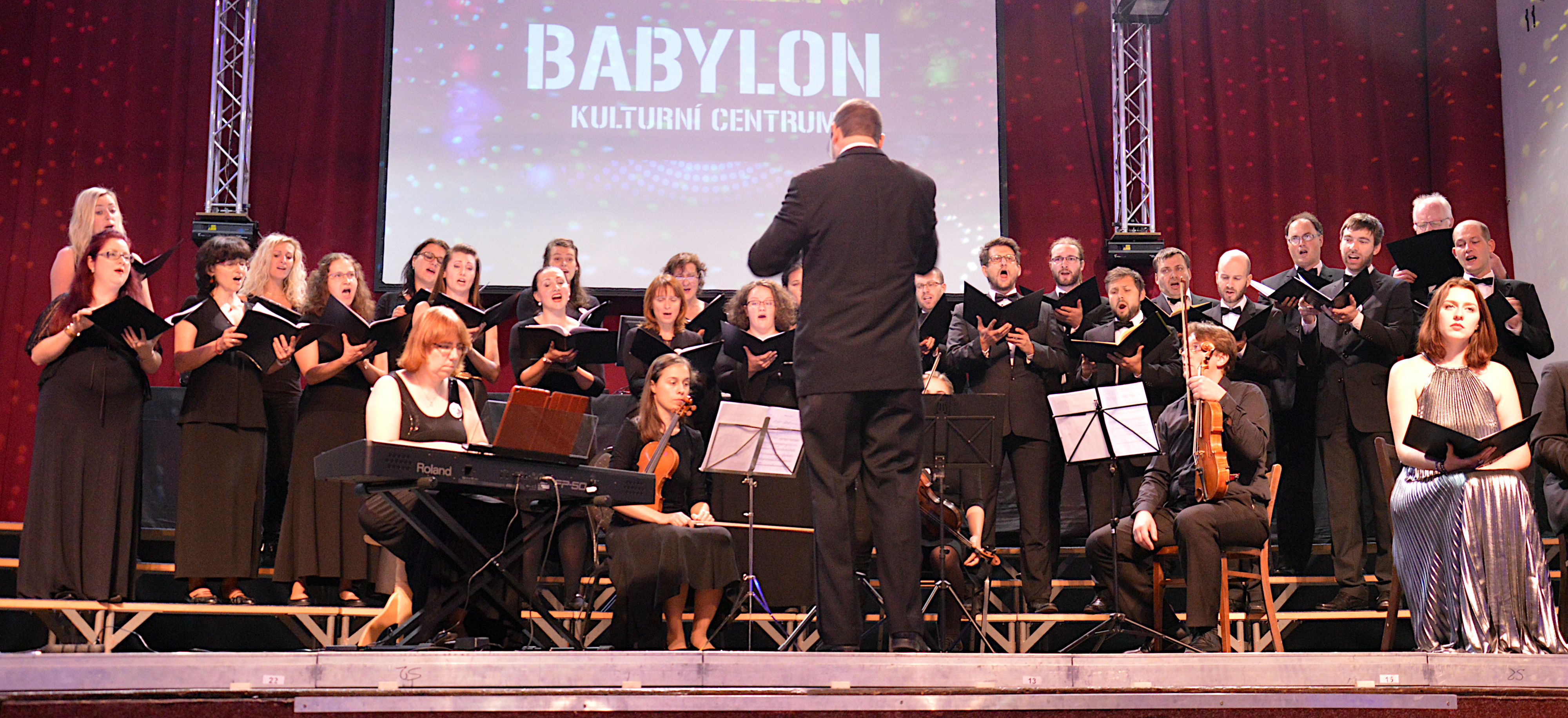 Sbor Ars Brunensis na slavnostním koncertě 100 let republika 20.10.2018 v Brně. Sbormistr Dan Kalousek